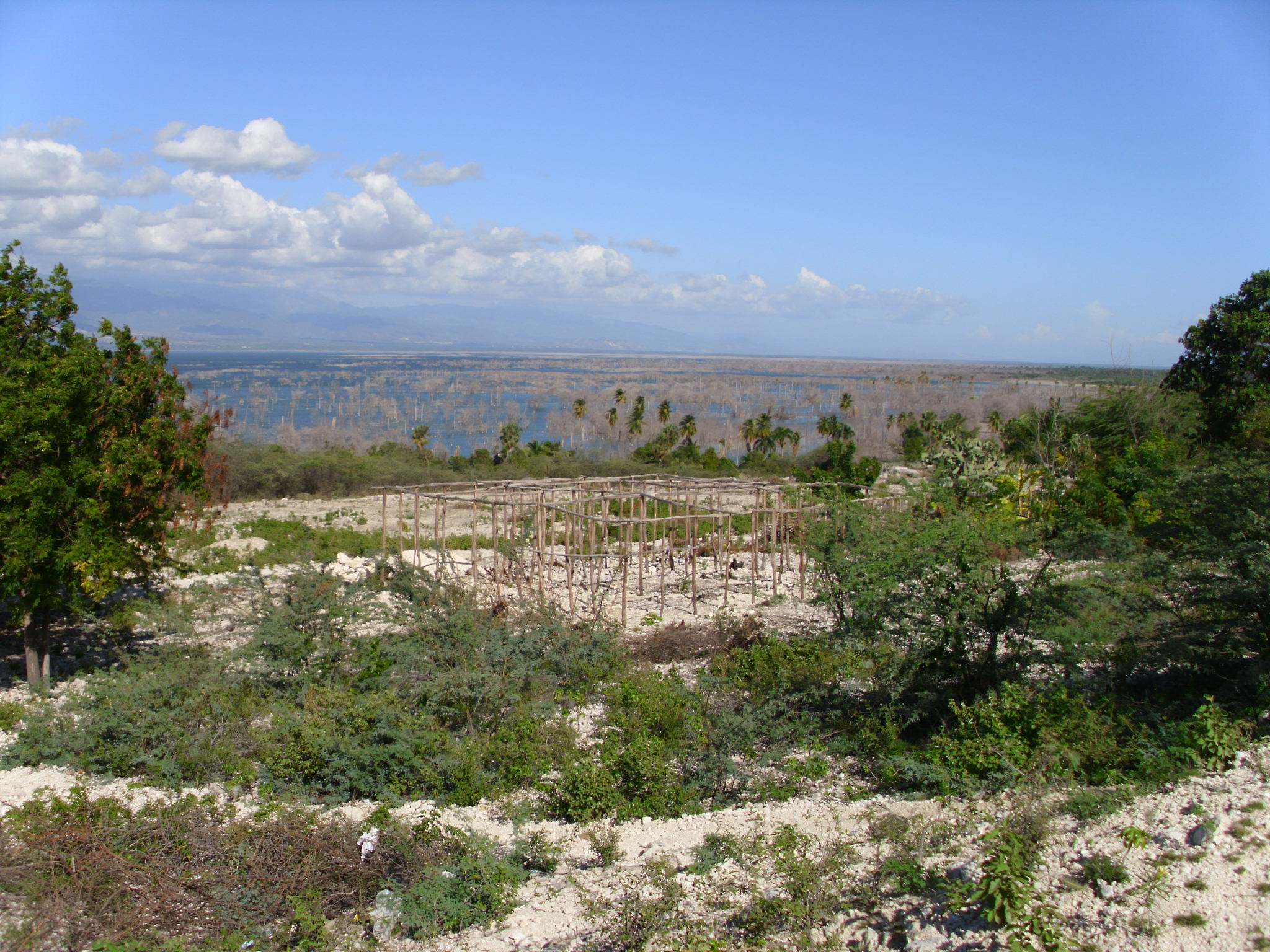 Het ondergelopen land door de uitbreiding van het Lago Eriquillo in het zuidelijke deel.